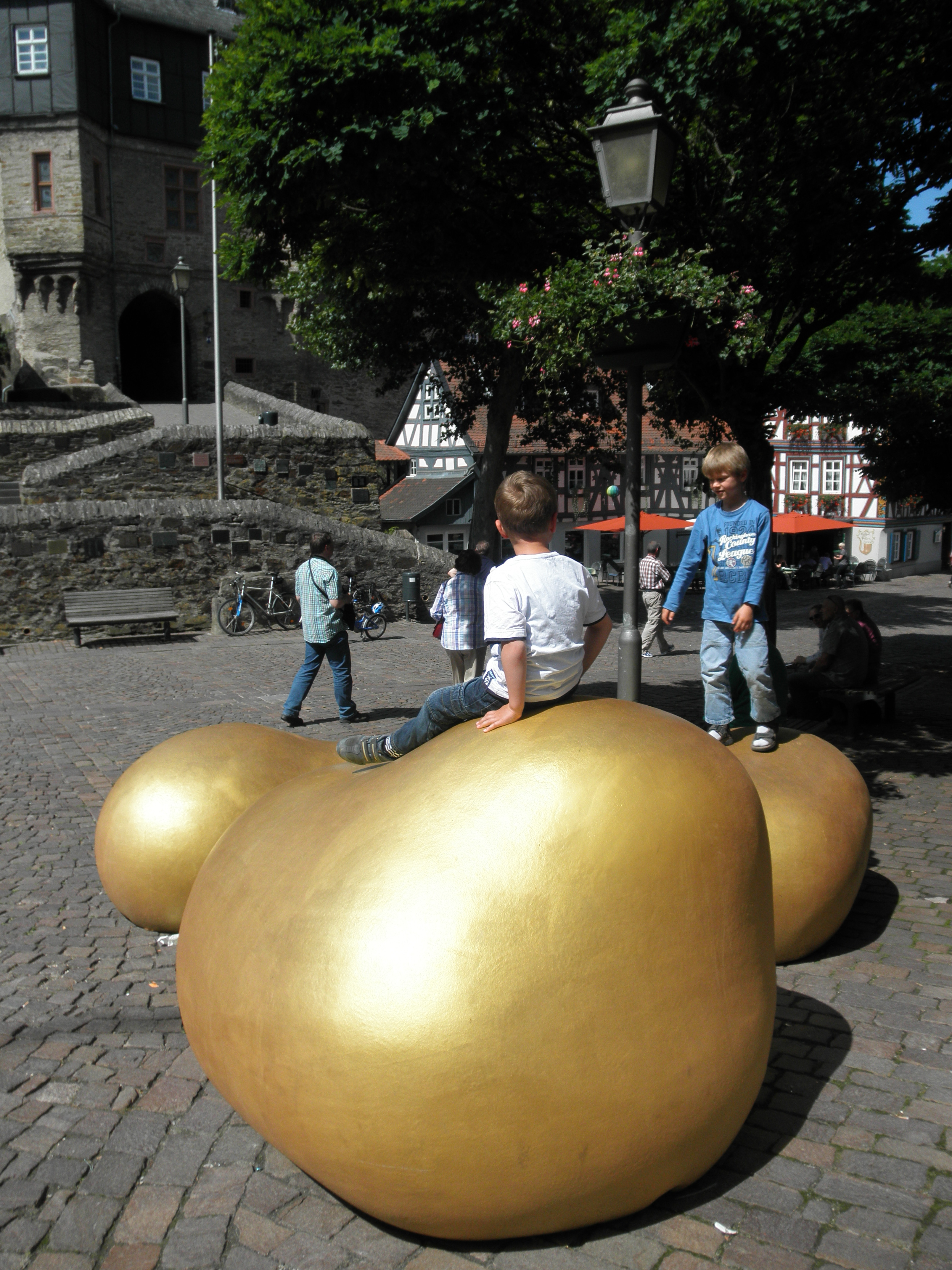 spielende Kinder am König-Adolf-Platz Idstein